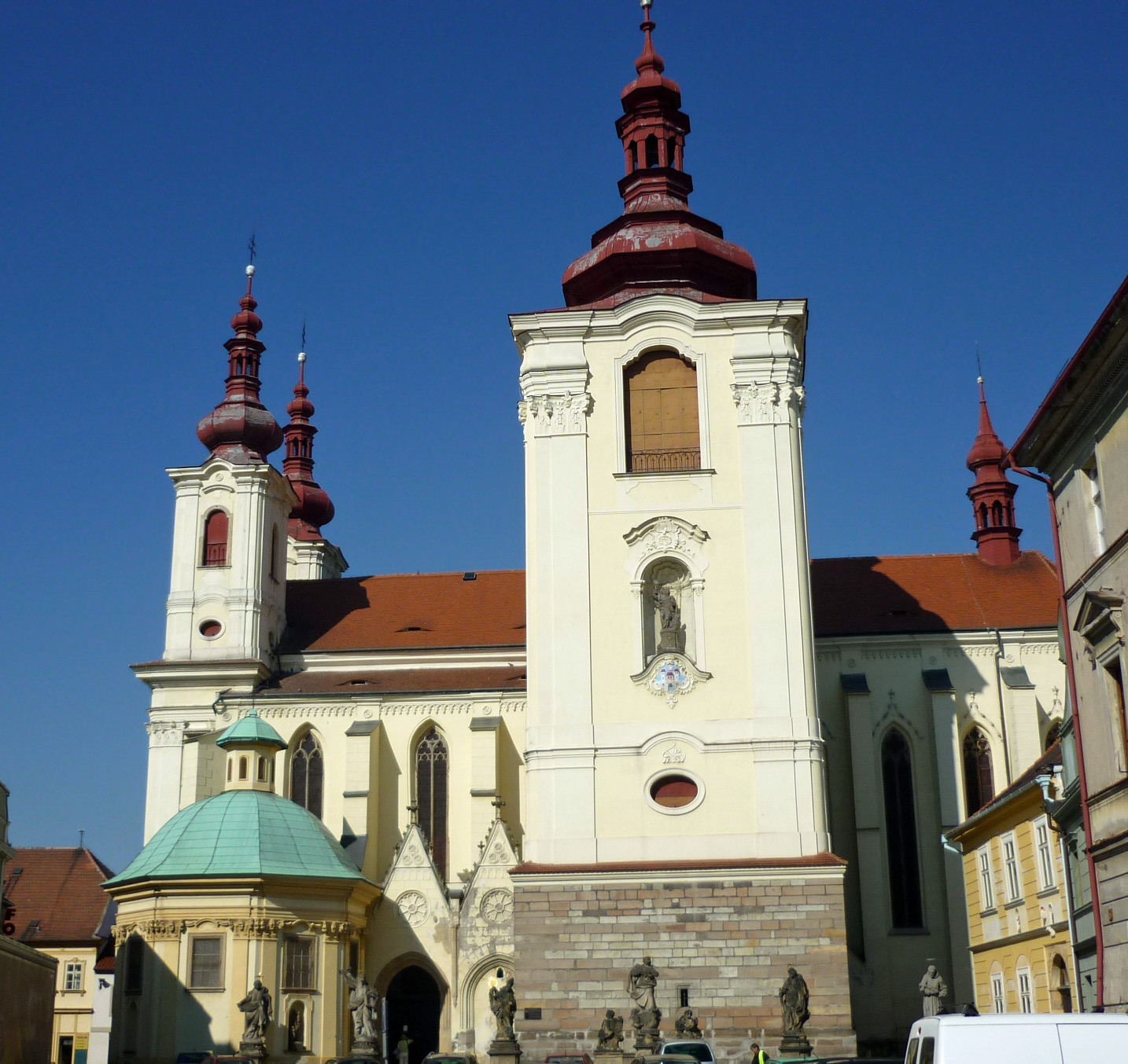 Stadtpfarrkirche Mariä Himmelfahrt in Saaz